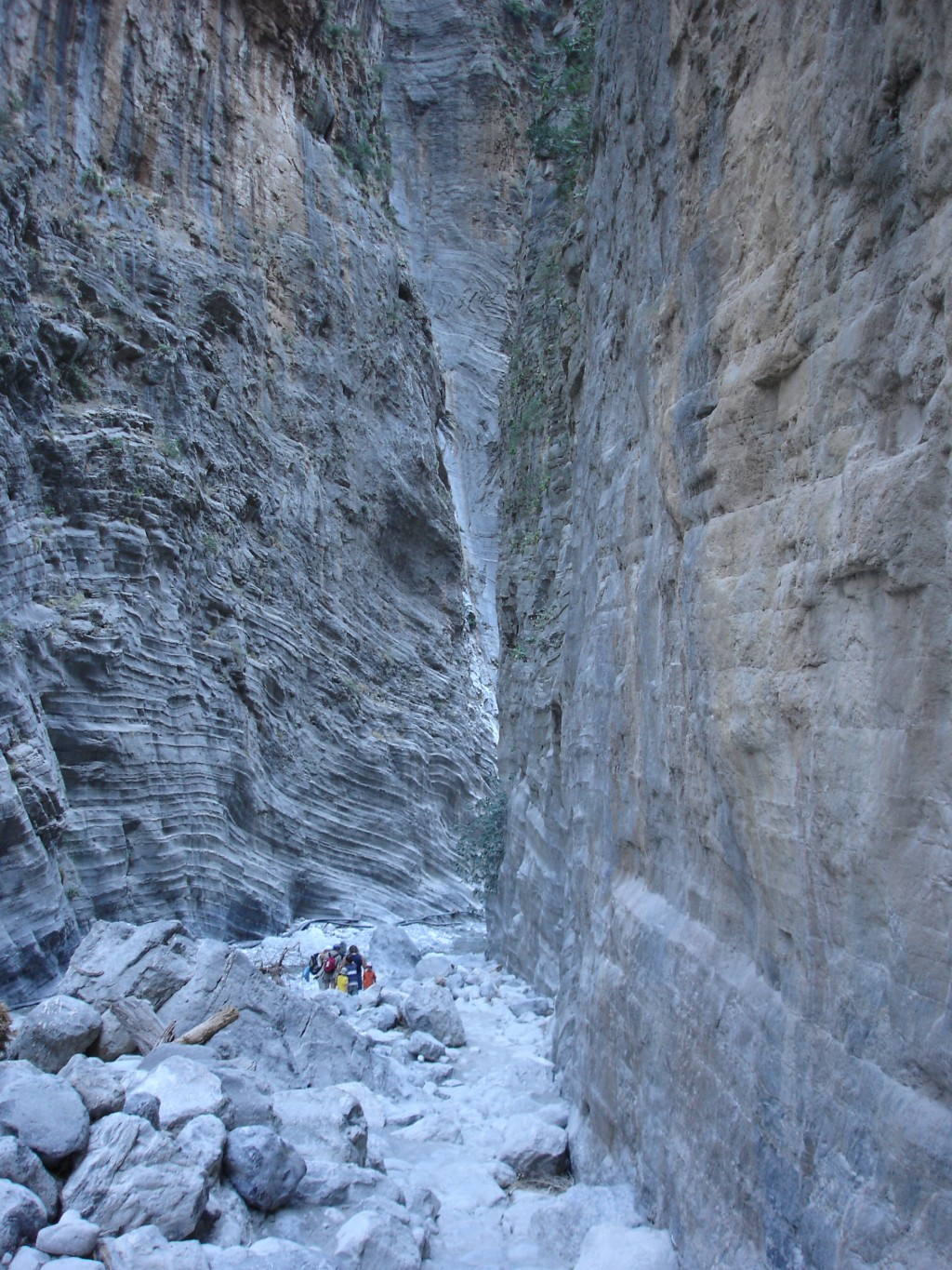 Samaria gorge in Creta